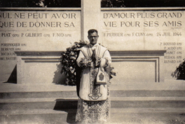 Visant an Enoret